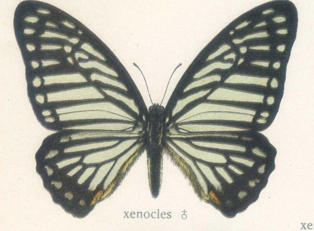 Papilio xenocles Dbl. f. xenocles Dbl. = Graphium xenocles xenocles (Doubleday, 1842), ♂, upperwing